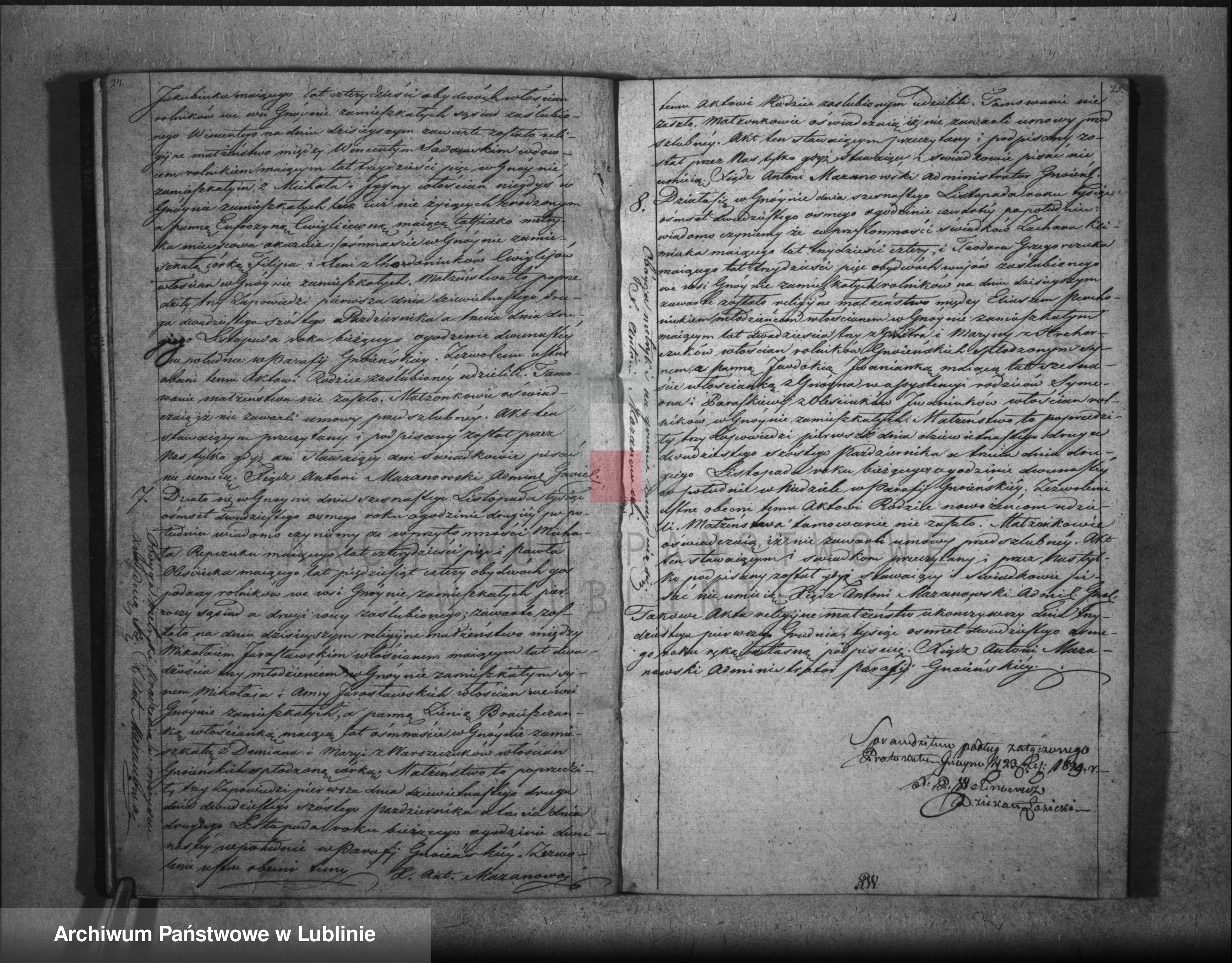 Записи в метрической книге прихода Гнойно, сделанные священником Антонием Мазановским в 1828. Акты о браке Винцентия Садовского и других жителей села Гнойно.